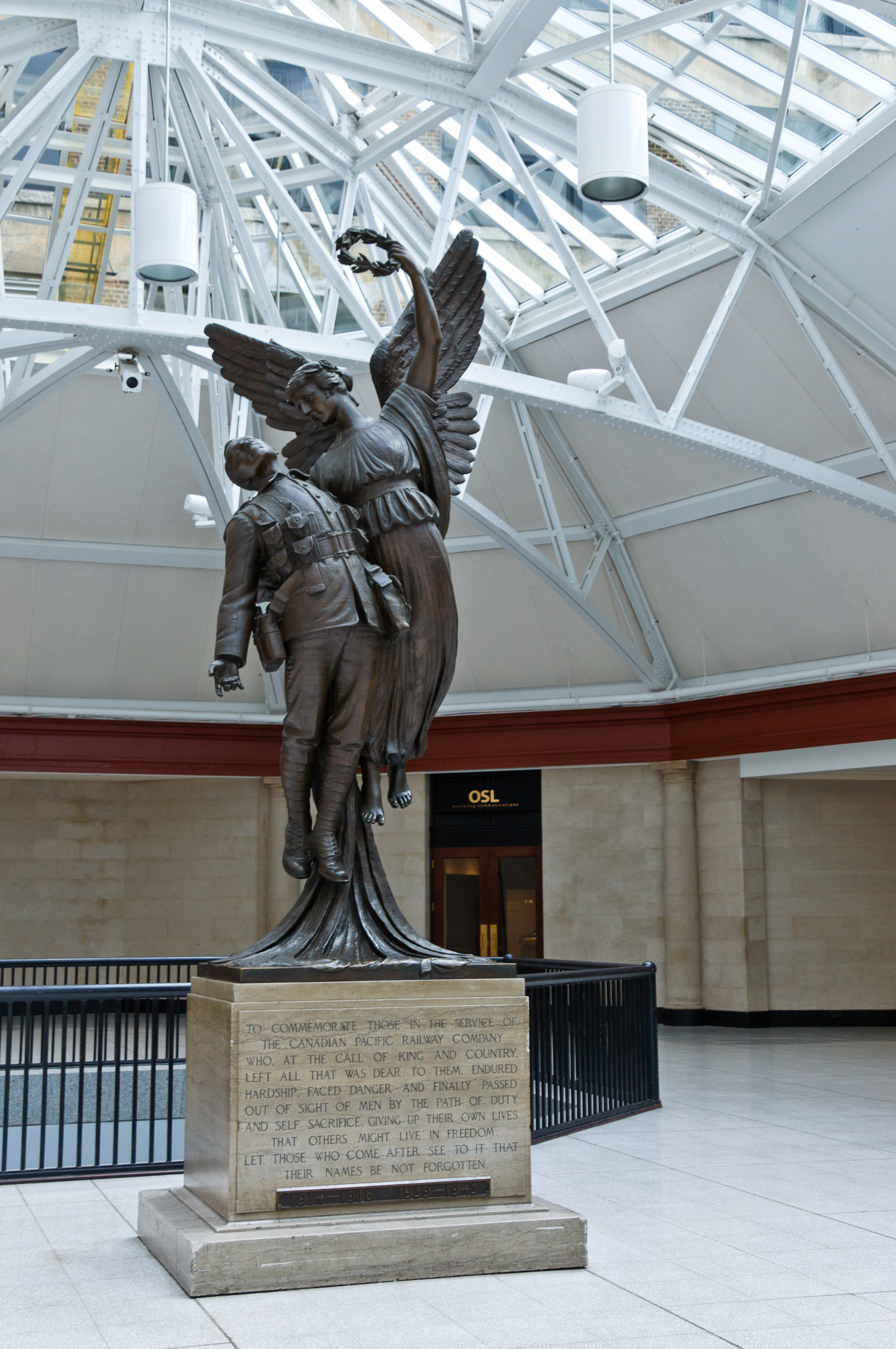 Gare Windsor, 1100, avenue des Canadiens-de-Montréal, (Canada). (Protection MH classé. Voir la liste des lieux patrimoniaux de Montréal pour plus de détails).